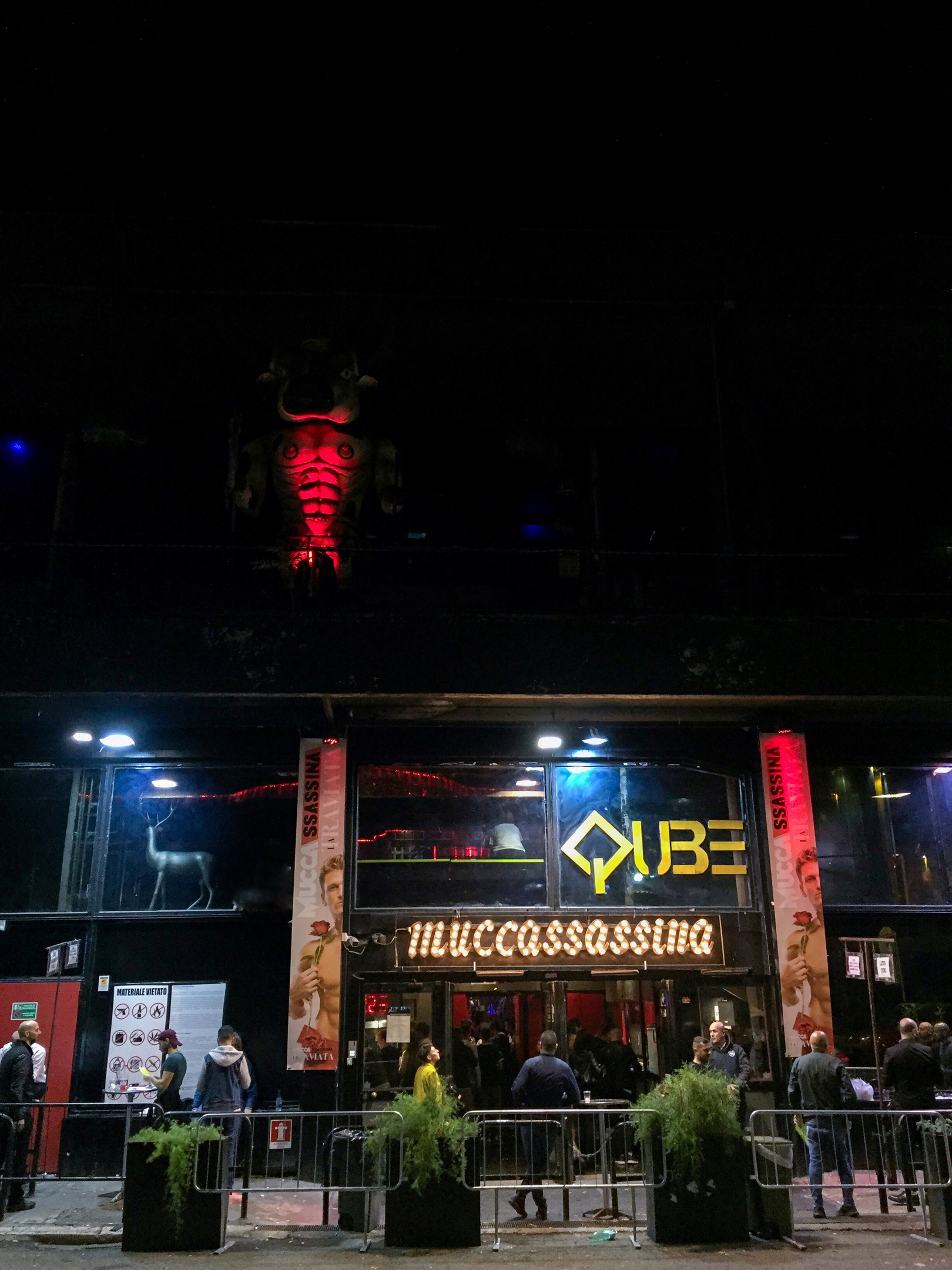 Qube, esterno discoteca durante una serata Muccassassina